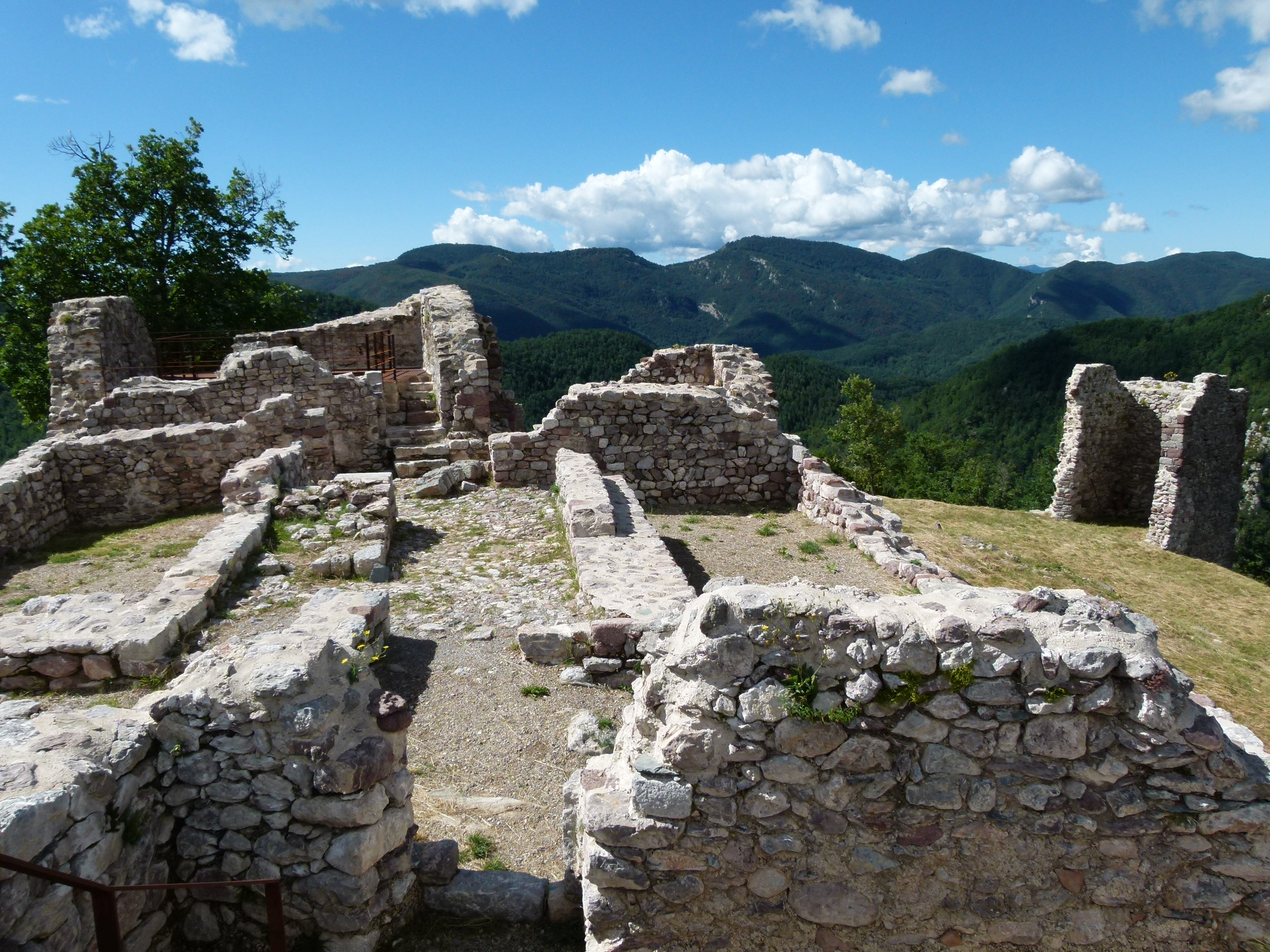 Castell de Rocabruna (Camprodon)